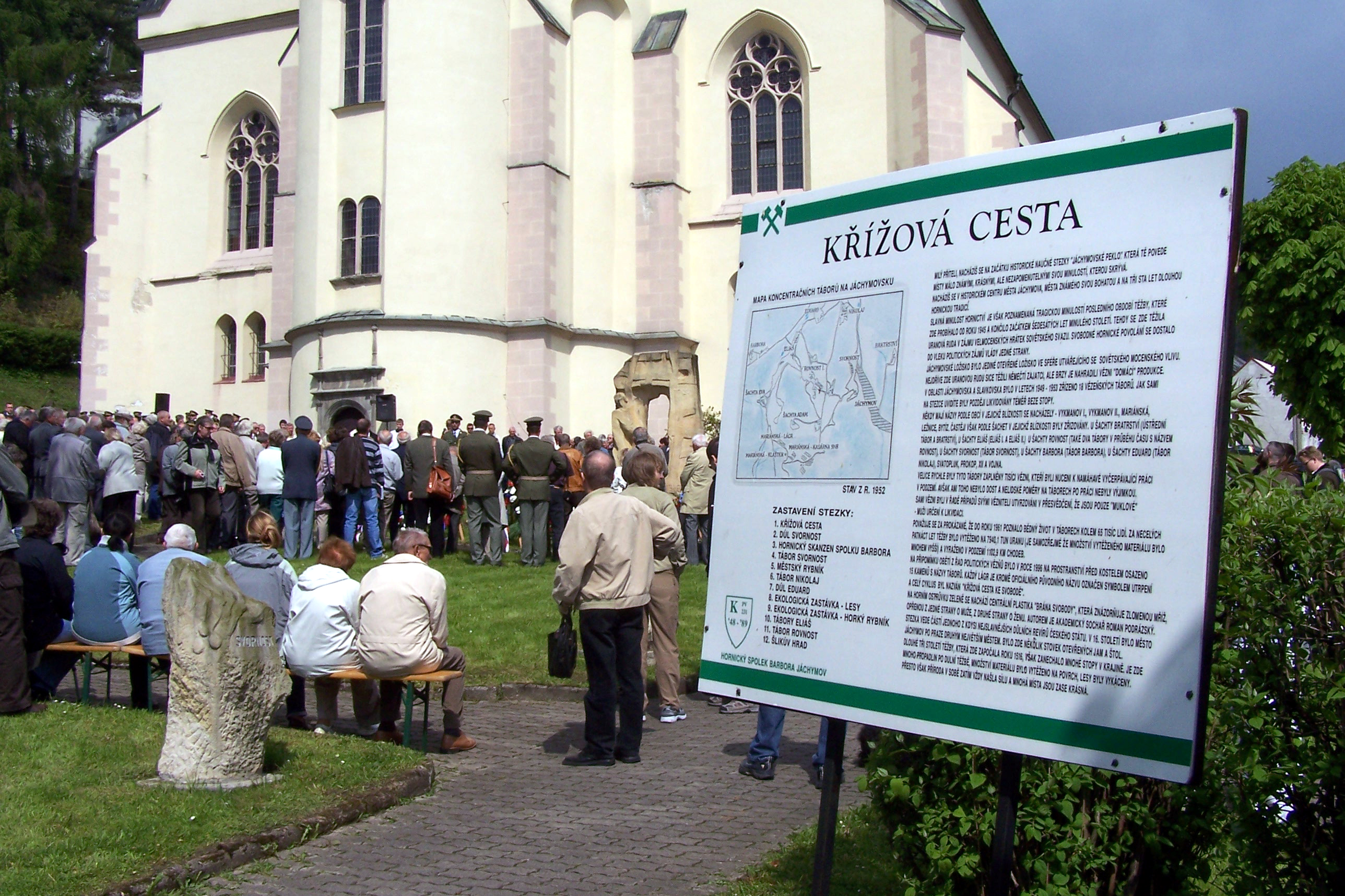 Zahájení hlavního sobotního programu.